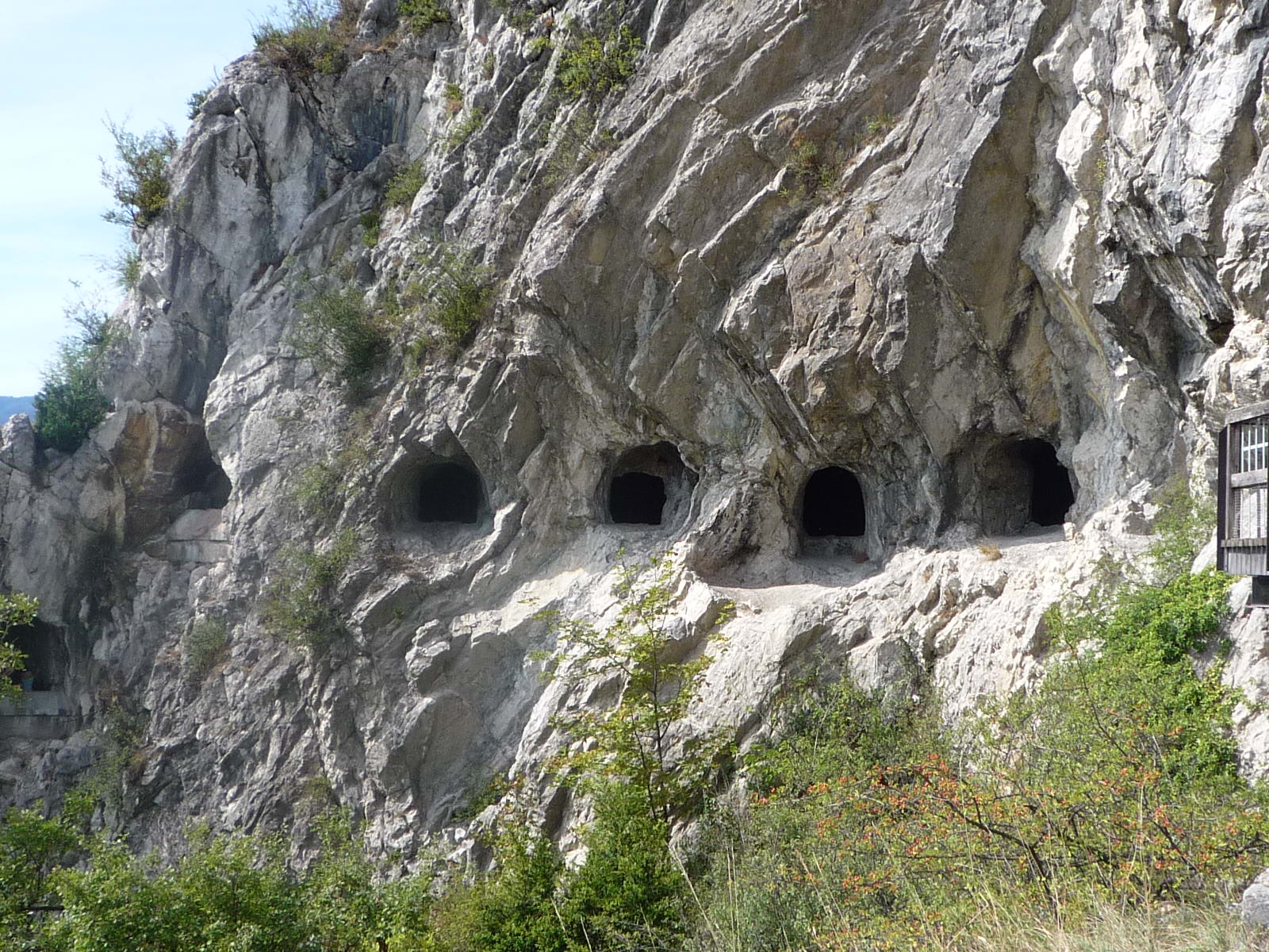 Grottes dites de Mandrin creusées vers 1845 en face du fort de la Bastille de Grenoble.